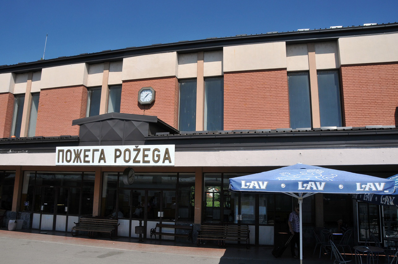 Požega rail station, Serbia